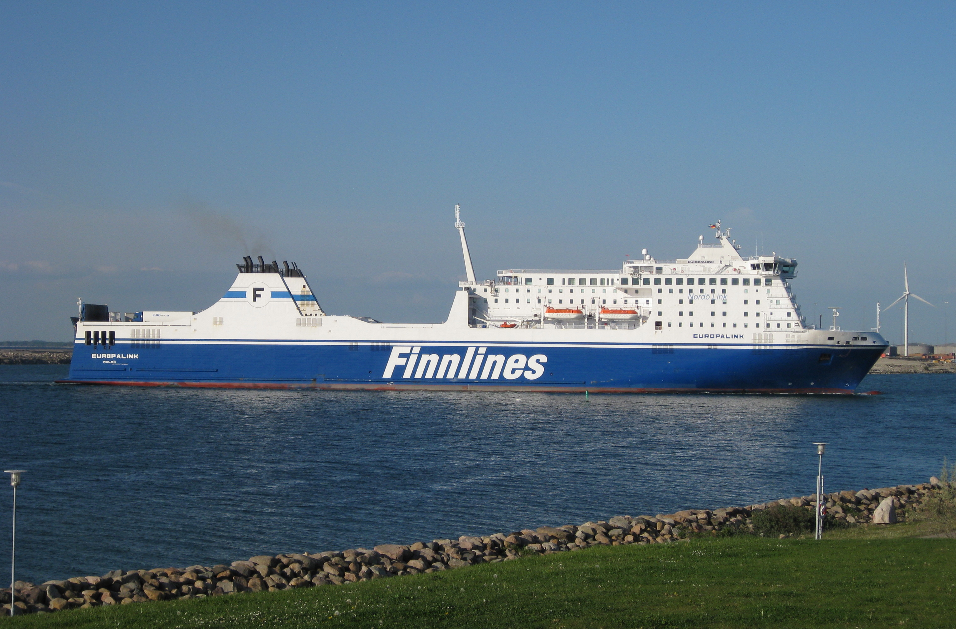 M/S Europalink entering Malmö harbour.